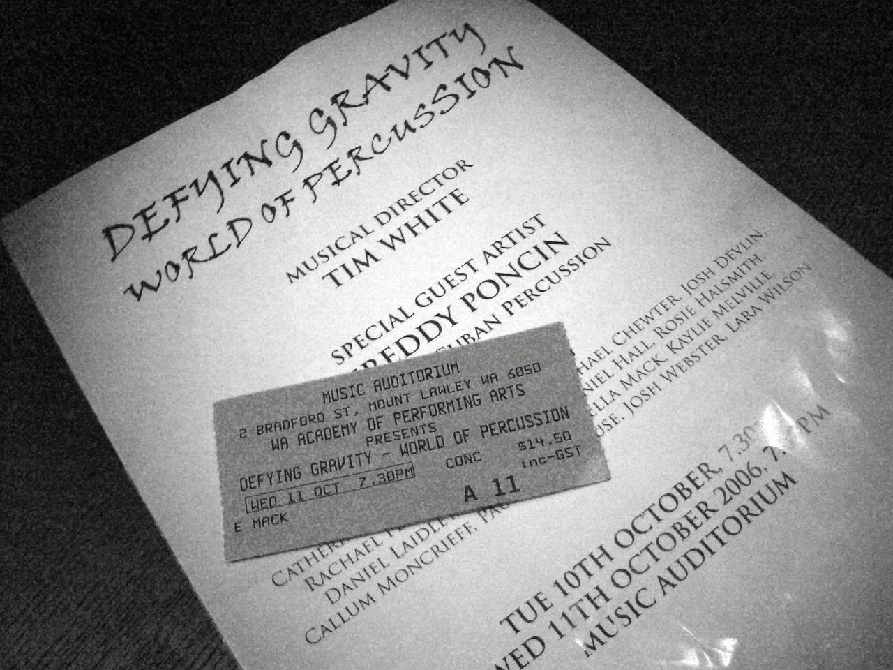 for percussion ensemble concert